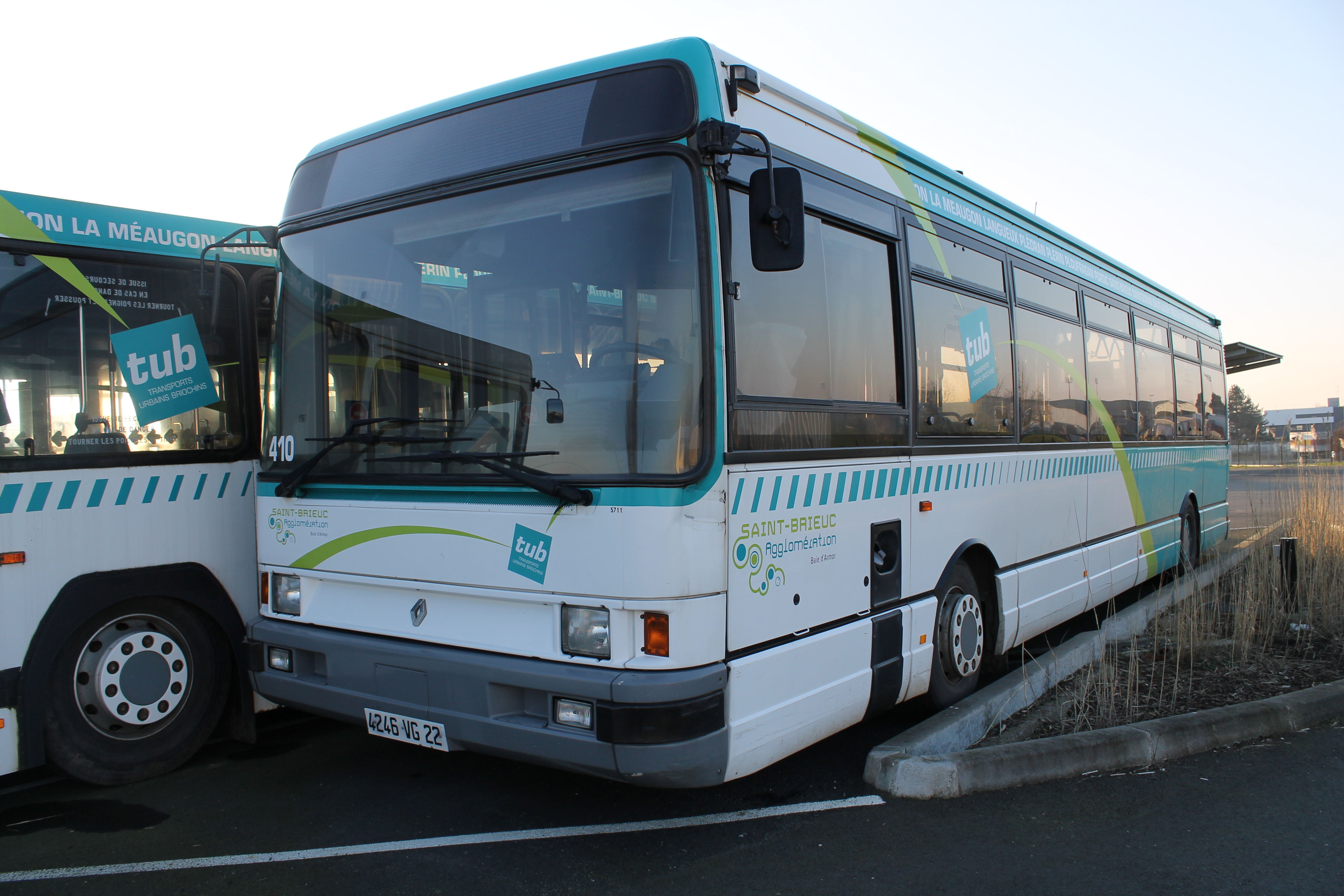 Renault R312 n°410 - TUB